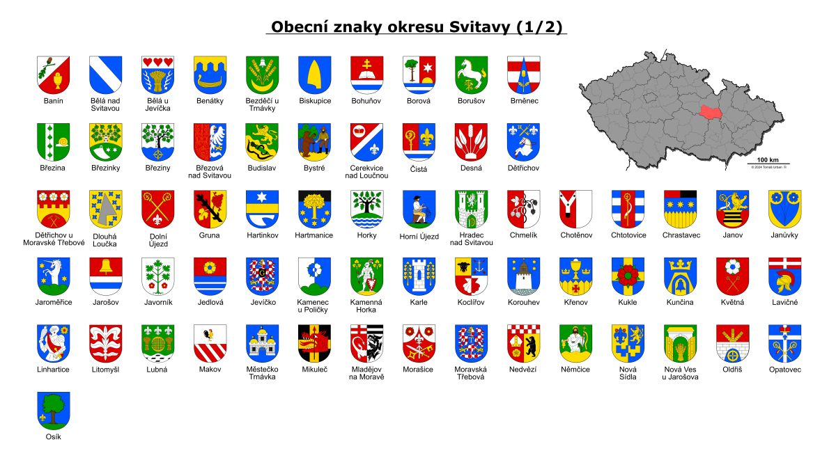 Přehled obecních znaků okresu Svitavy